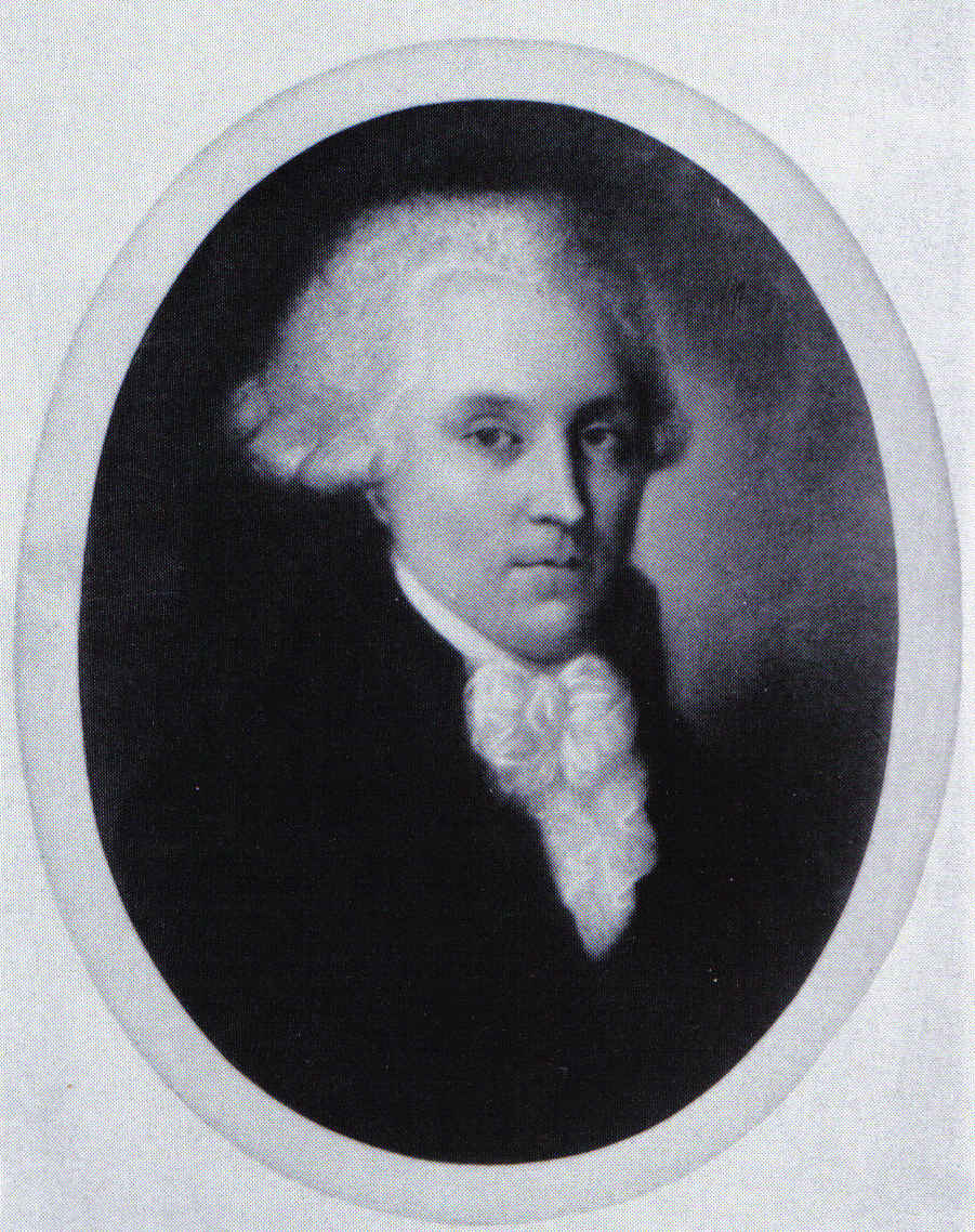 Johann Aloys Joseph Freiherr von Hügel, kaiserlicher Konkommissarius am Reichstag zu Regensburg